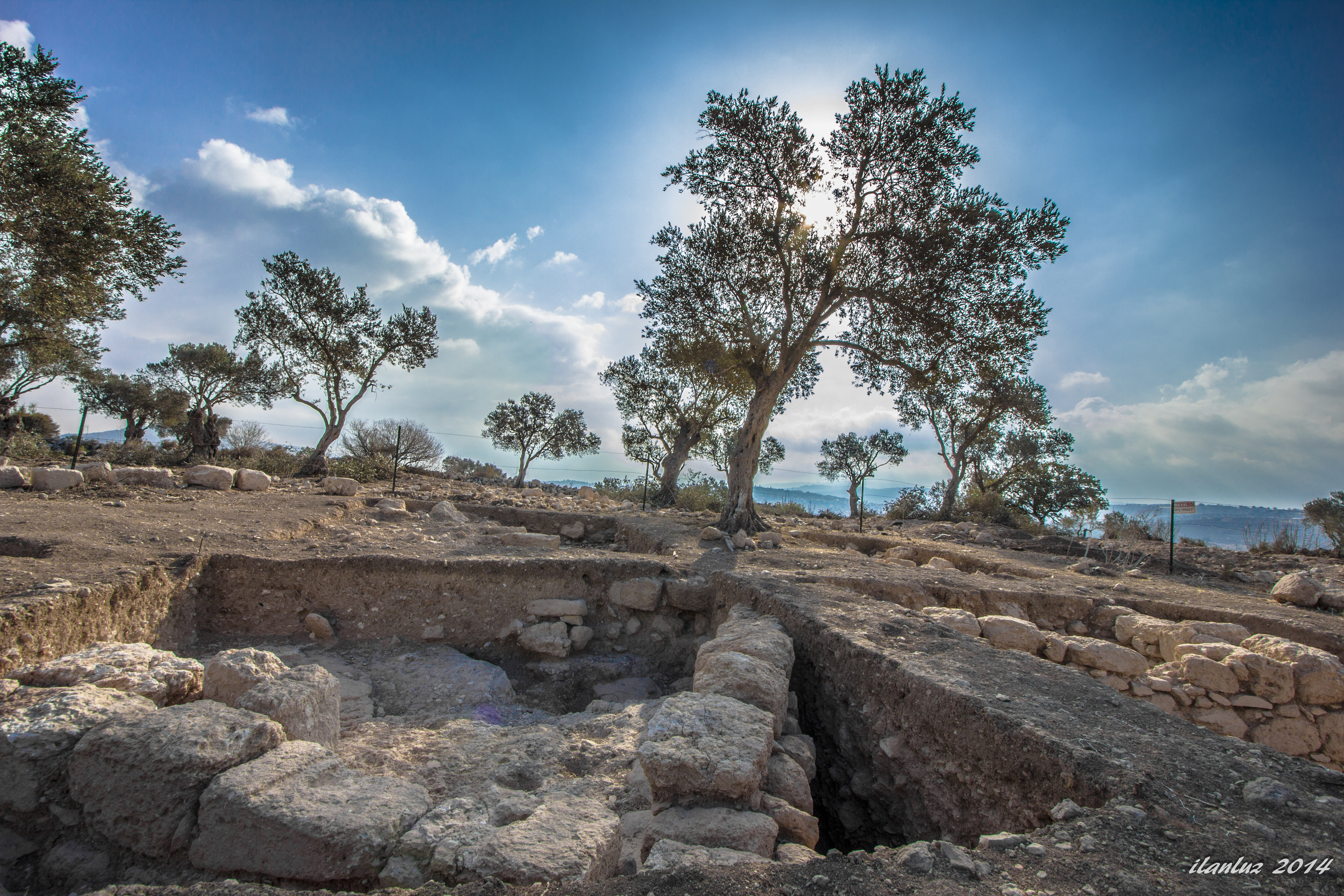 יישוב עתיק יהודי מימי בית שני המשנה והתלמוד שישבו בו תנאים ואמוראים. מקומו של היישוב זוהה עם האתר ארכולוגי השוכן מצפון ליישוב העתיק ציפורי ומדרום לכביש 77 ליד הושעיה. בעבר ההשערה הייתה שהיישוב שכן בתל חנתון. משמעות השם "שיחין" היא מאגר מים לא מקורה, ארוך וצר